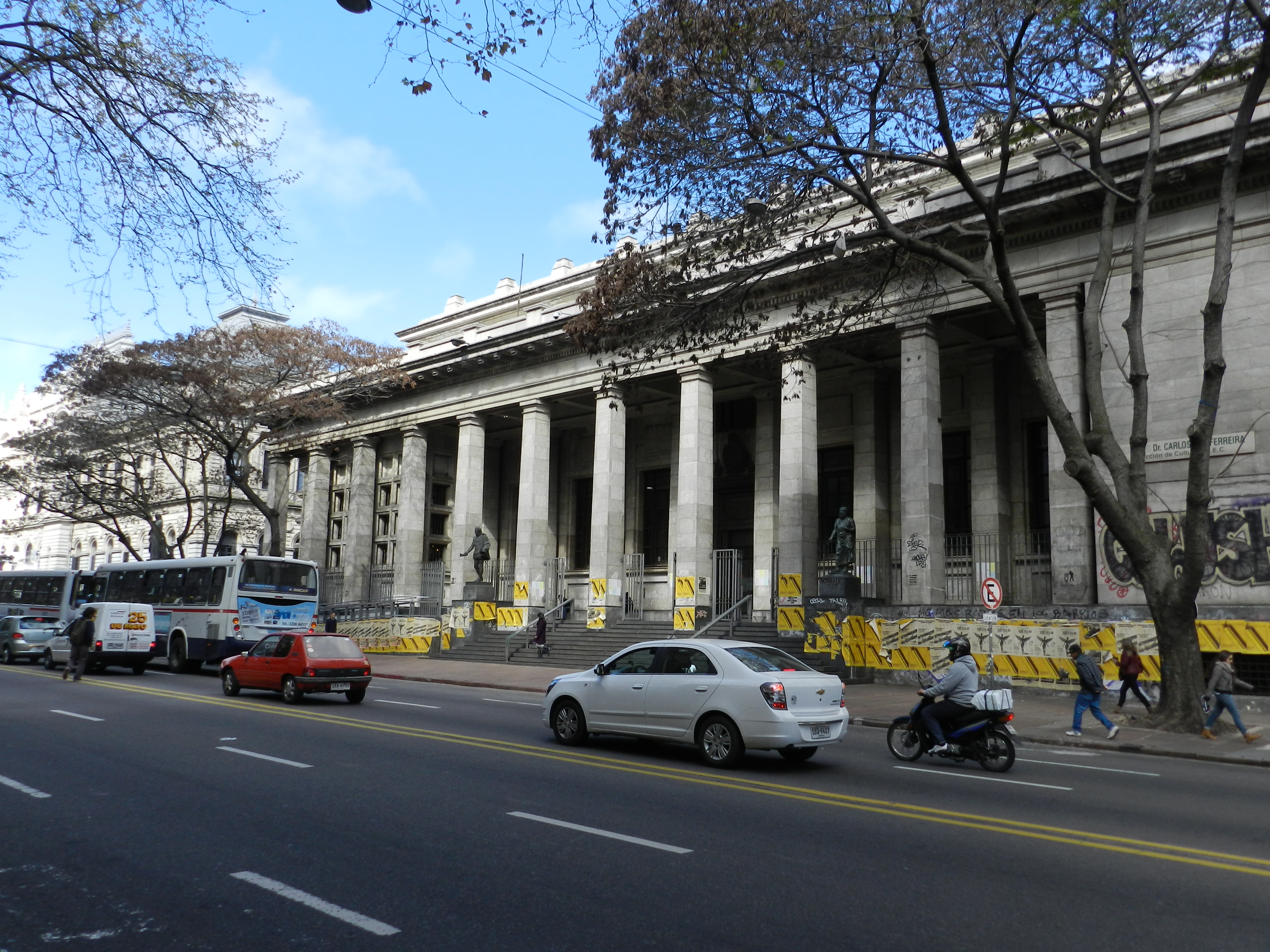 Biblioteca Nacional. Ubicada en el departamento de Montevideo